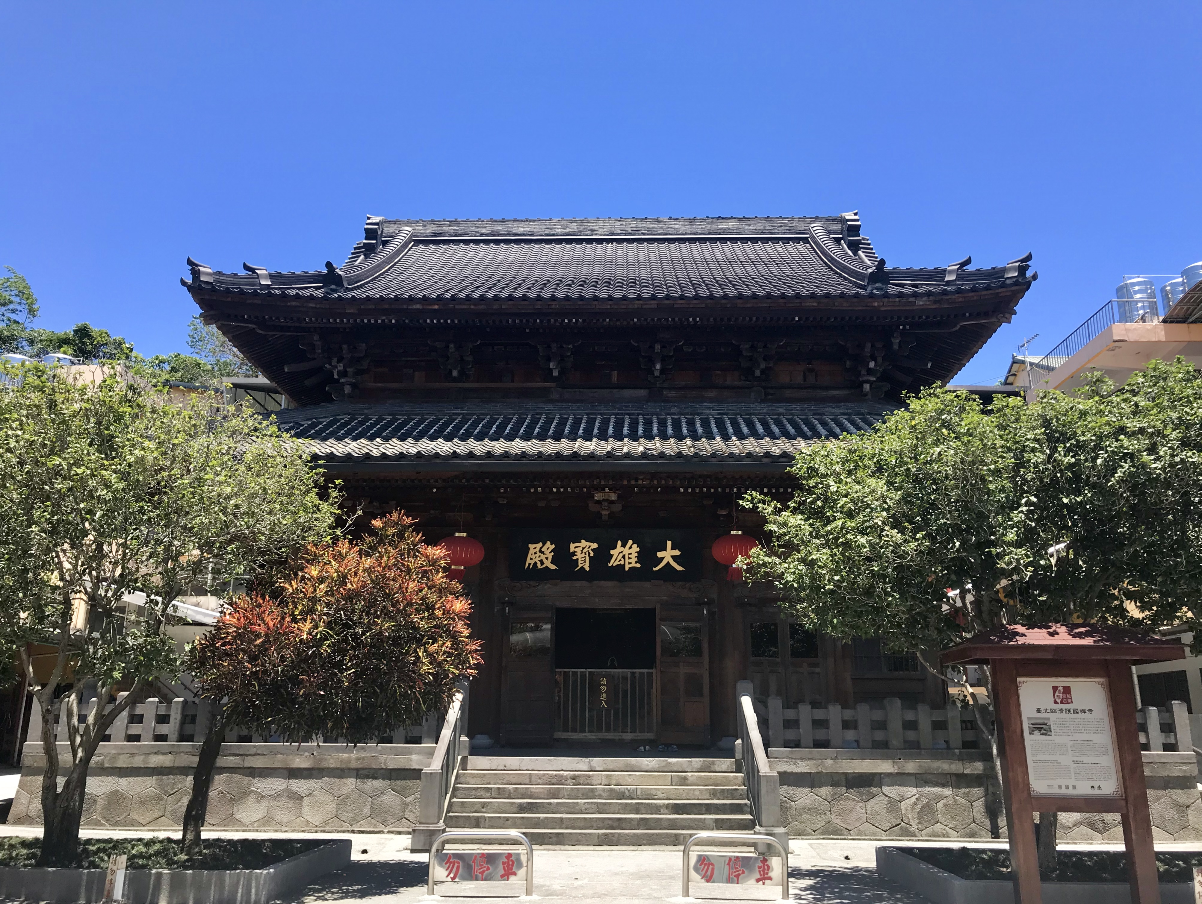 臨濟護國禪寺大雄寶殿正面照